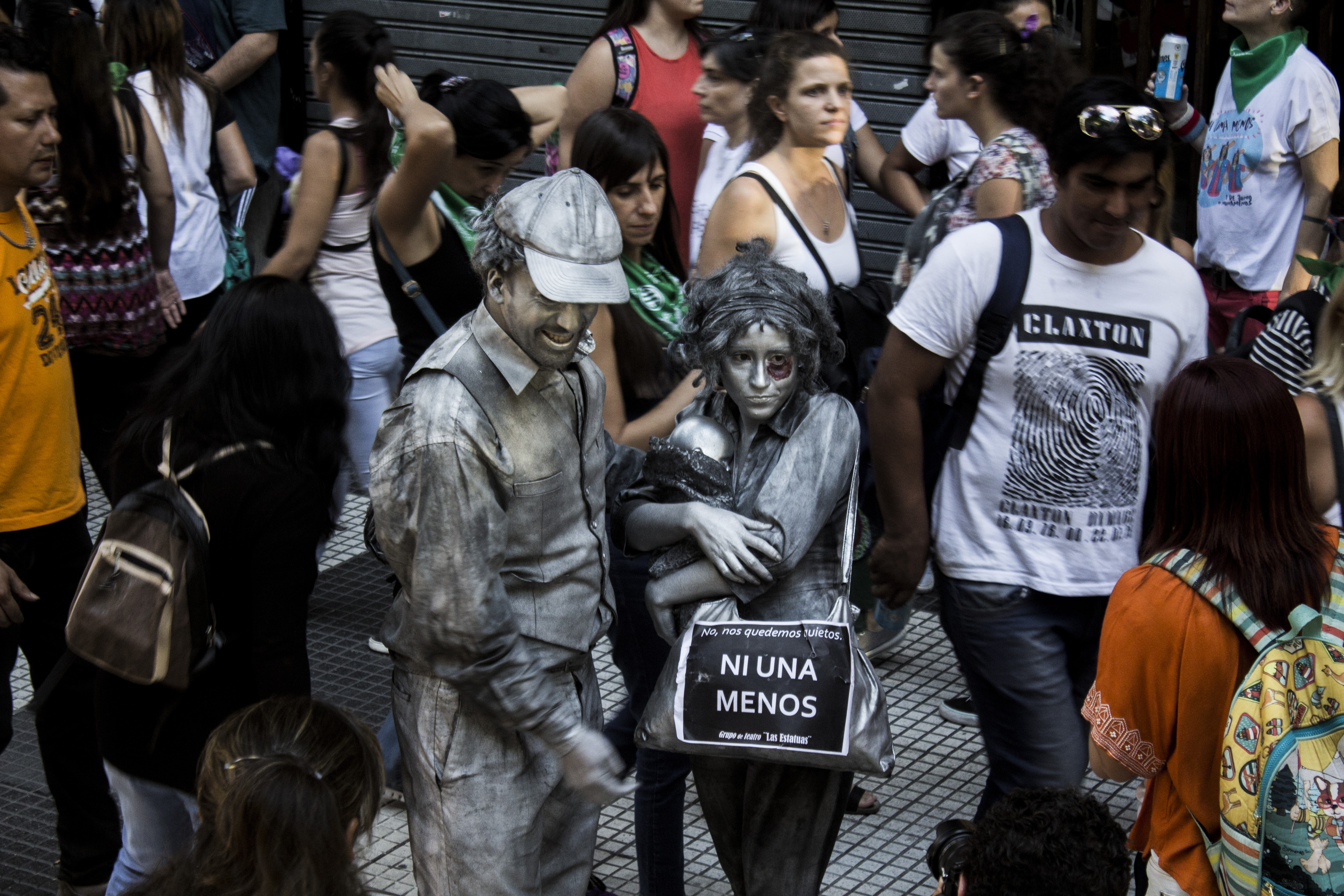 Paro internacional de mujeres 2018, Ciudad Autónoma de Buenos Aires, Argentina.